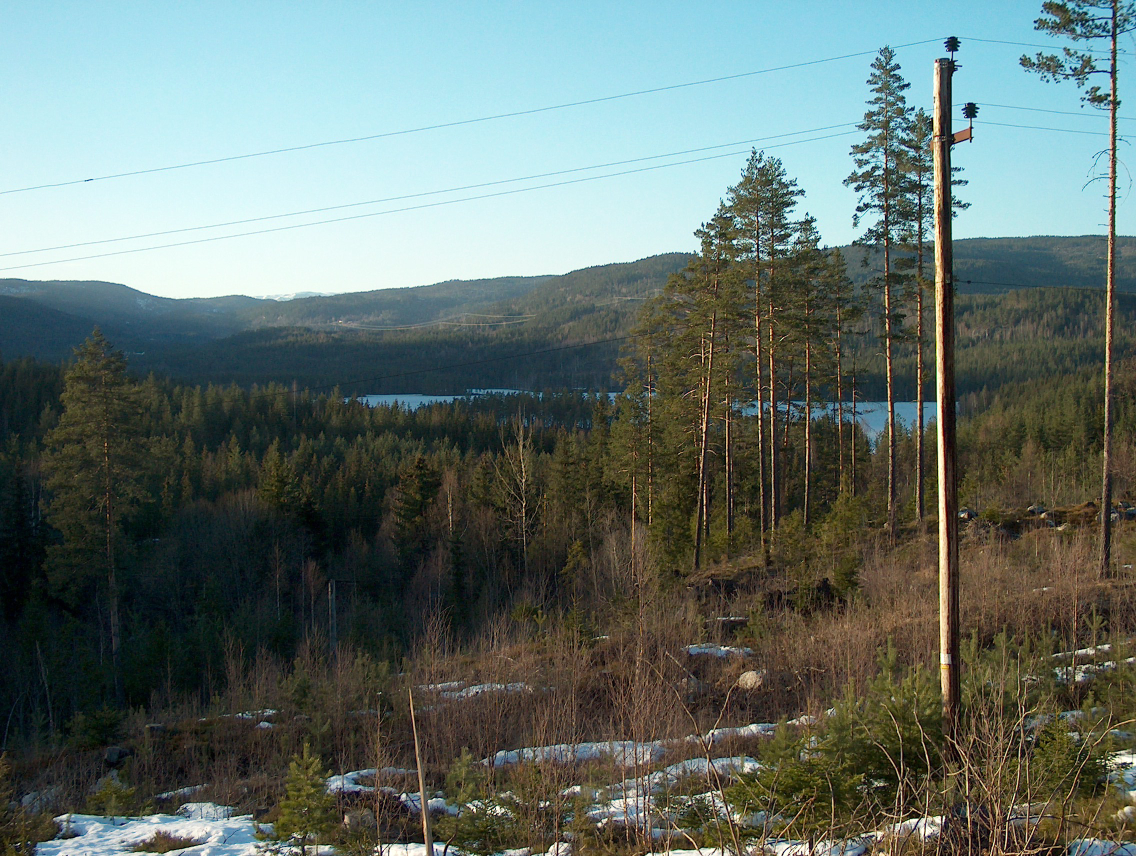 Utsyn mot Breivannet fra Rallerud